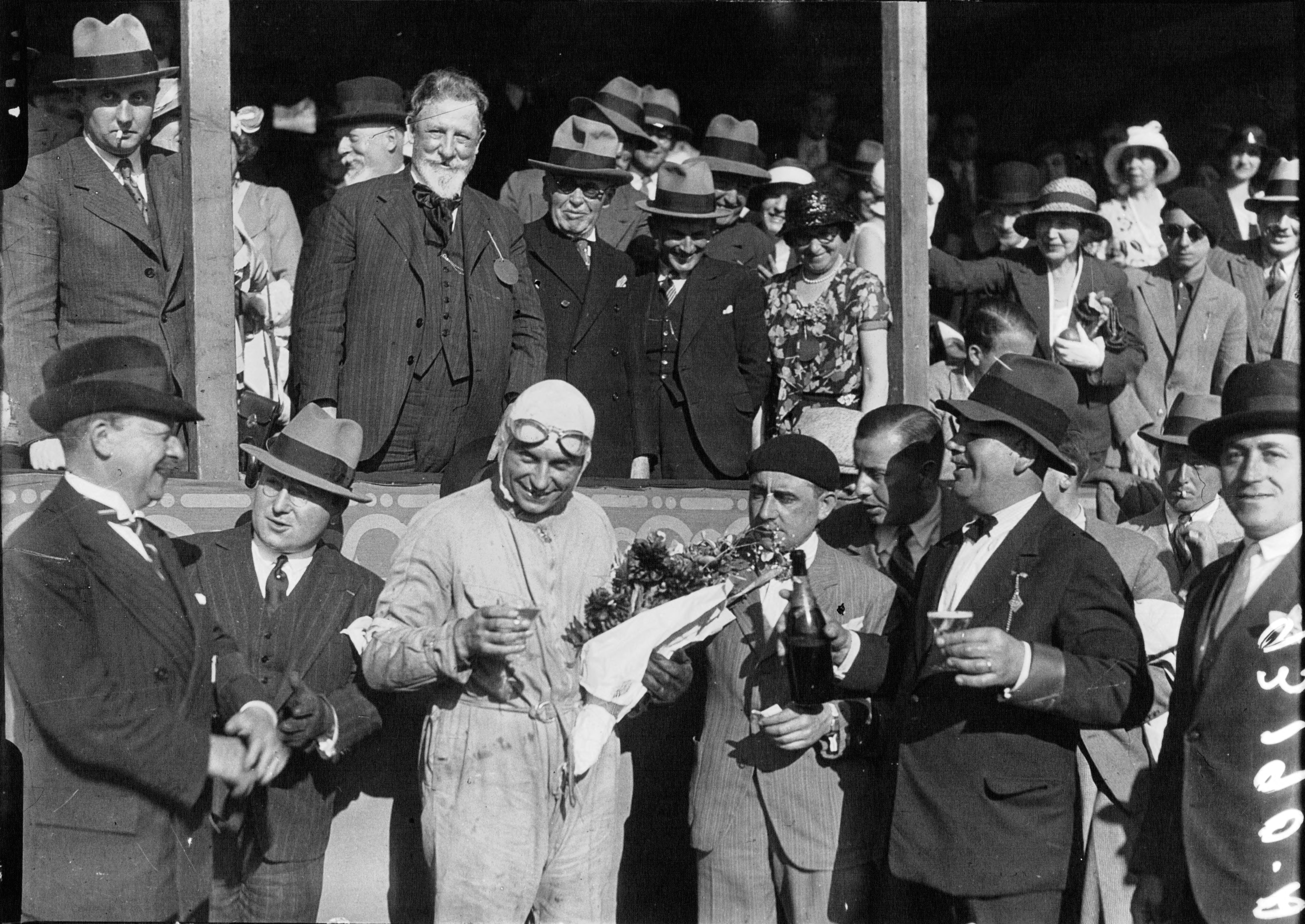 Nîmes, grand prix de Nîmes : [portrait de Benoit] en vitesse